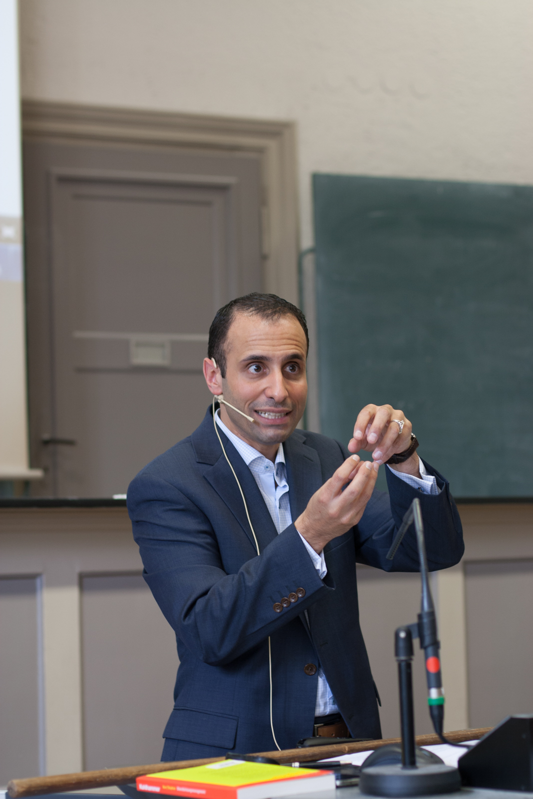 Marcello Camerin